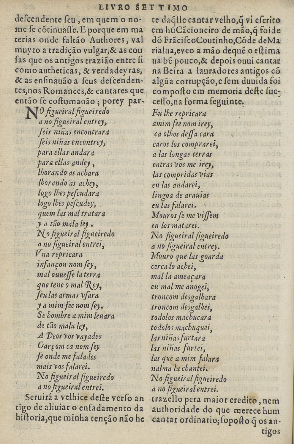 "No figueiral figueiredo" ou "Canção do figueiral" tal como foi publicada na segunda parte da "Monarquia Lusitana" de Bernardo de Brito, 1609.